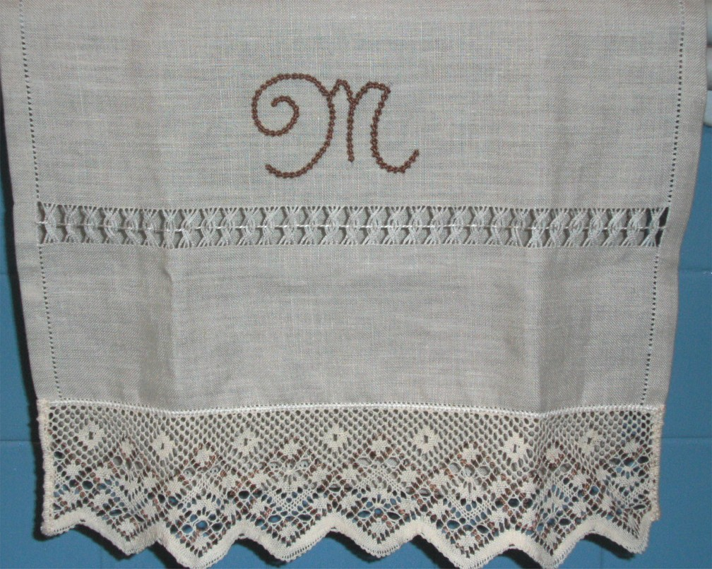 Cubretoallas bordado a punto de Palestrina y vainica, con puntilla de encaje incrustada